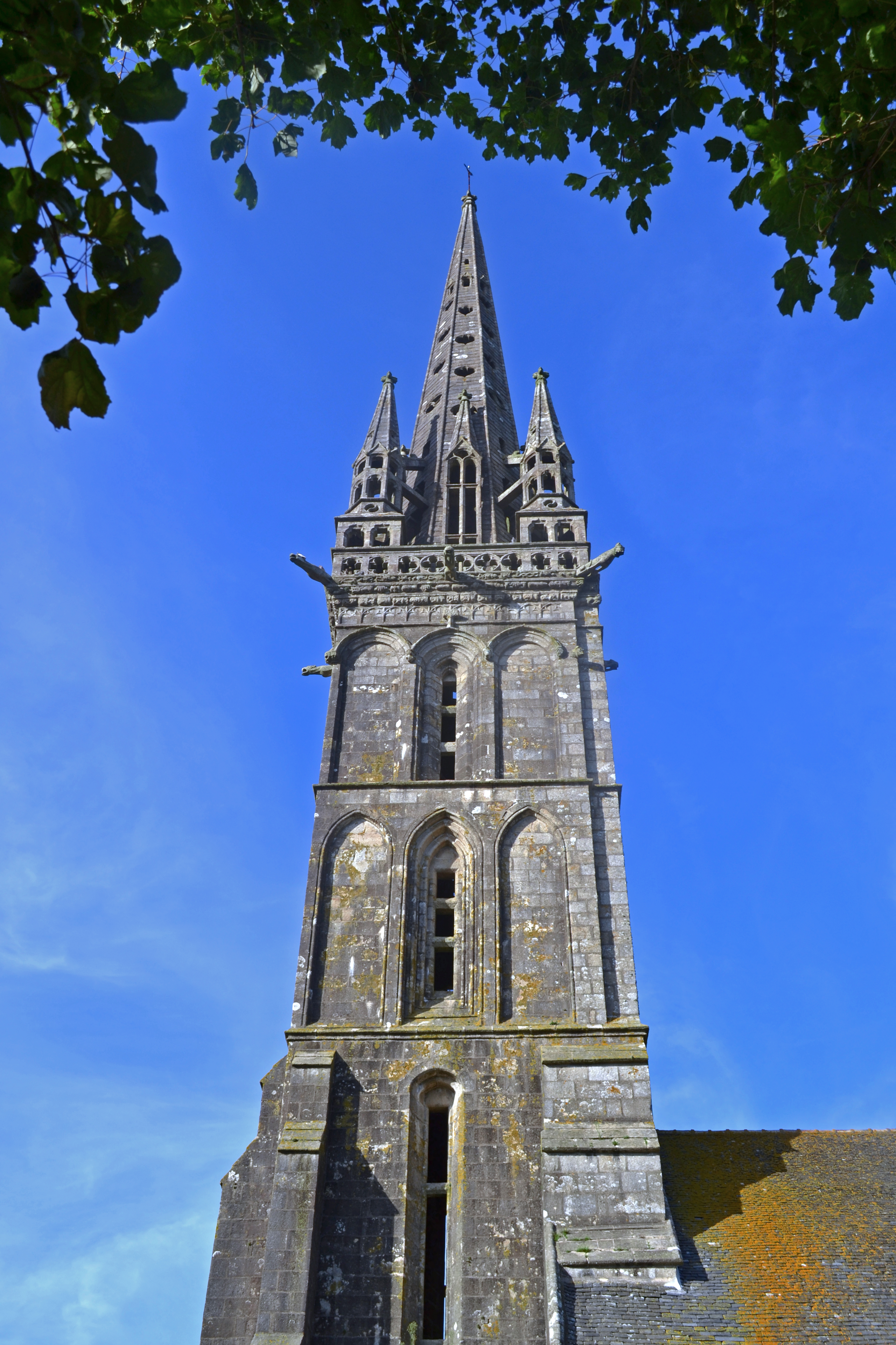 La chapelle Notre-Dame de Lambader à Plouvorn (29).